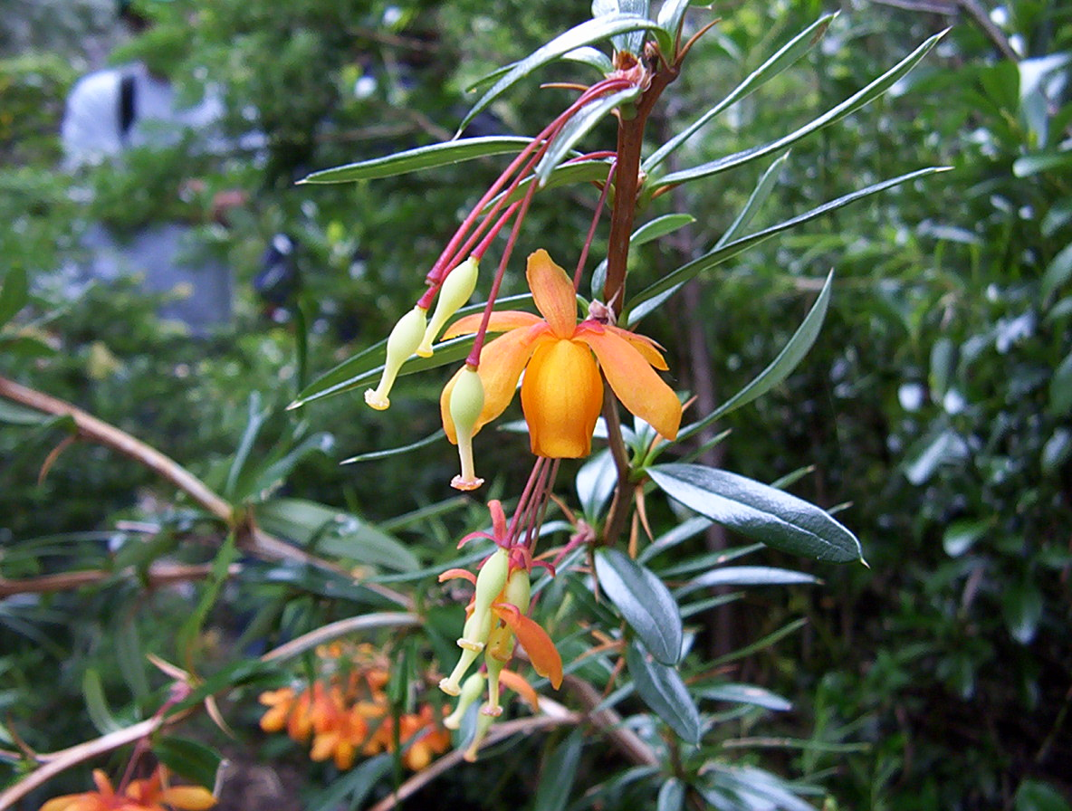 Berberis trigona (Michay), obtenida en Predio San Pablo de Tregua, en la provincia de Valdivia, Chile